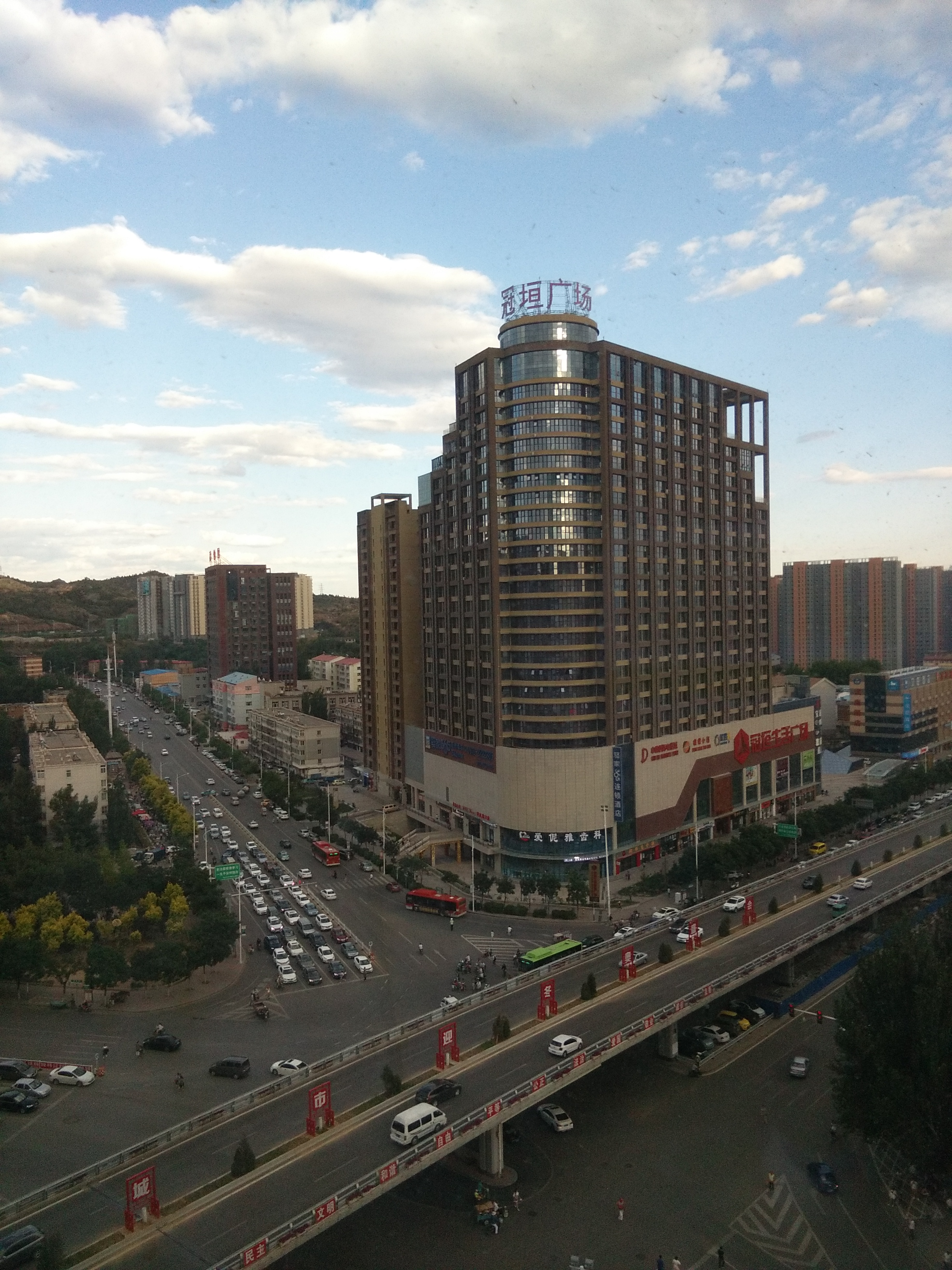 张家口市红旗楼，正中为冠垣广场